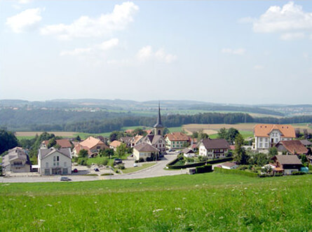 village arconciel